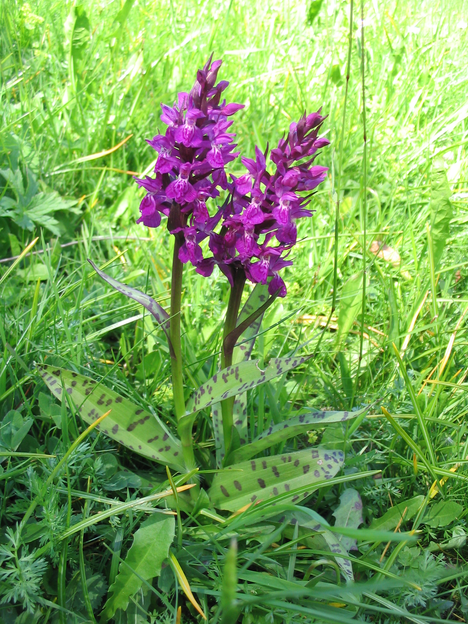 Dactylorhiza majalis, de: Breitblättriges Knabenkraut, Fundort: Alm oberhalb Lauterbrunnen (bei Interlaken)